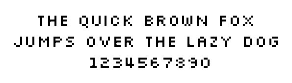 Pixelfont